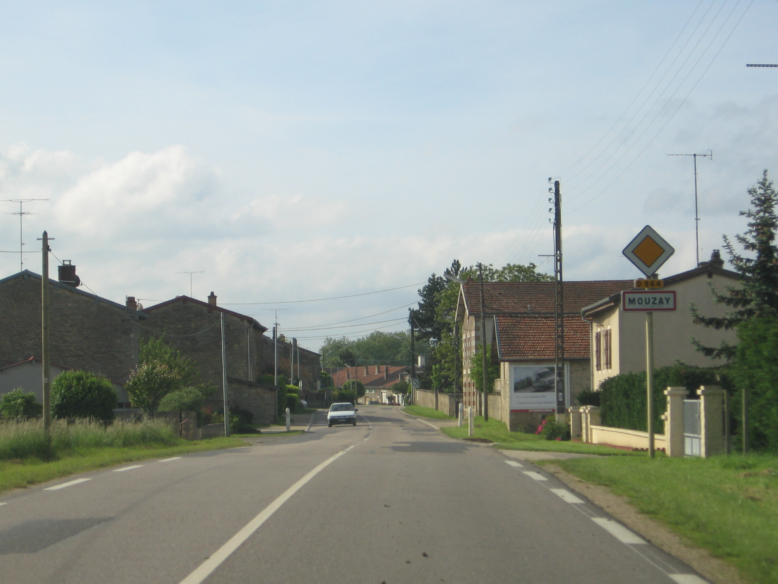 Mouzay